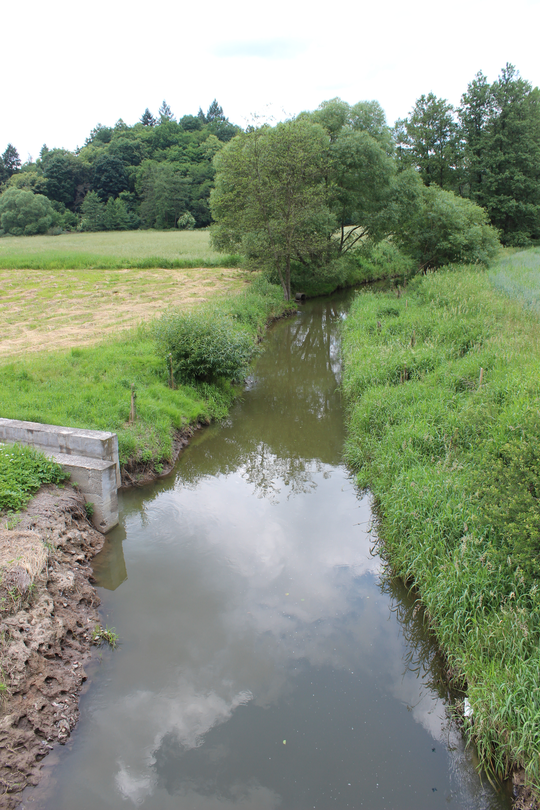 Pohled (západním směrem) z mostu přes Loděnici na říčku. Vlevo přítok vodního toku z Bratronic.